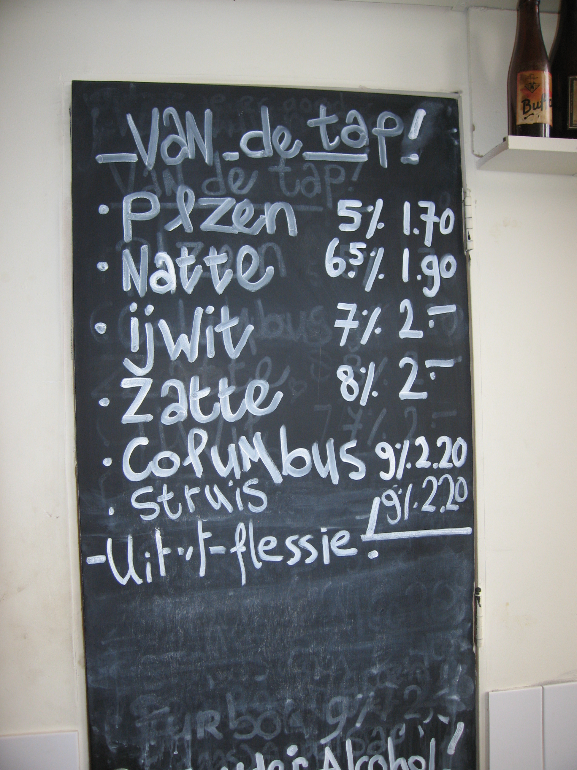 Draft list at Brewery 't IJ, Amsterdam